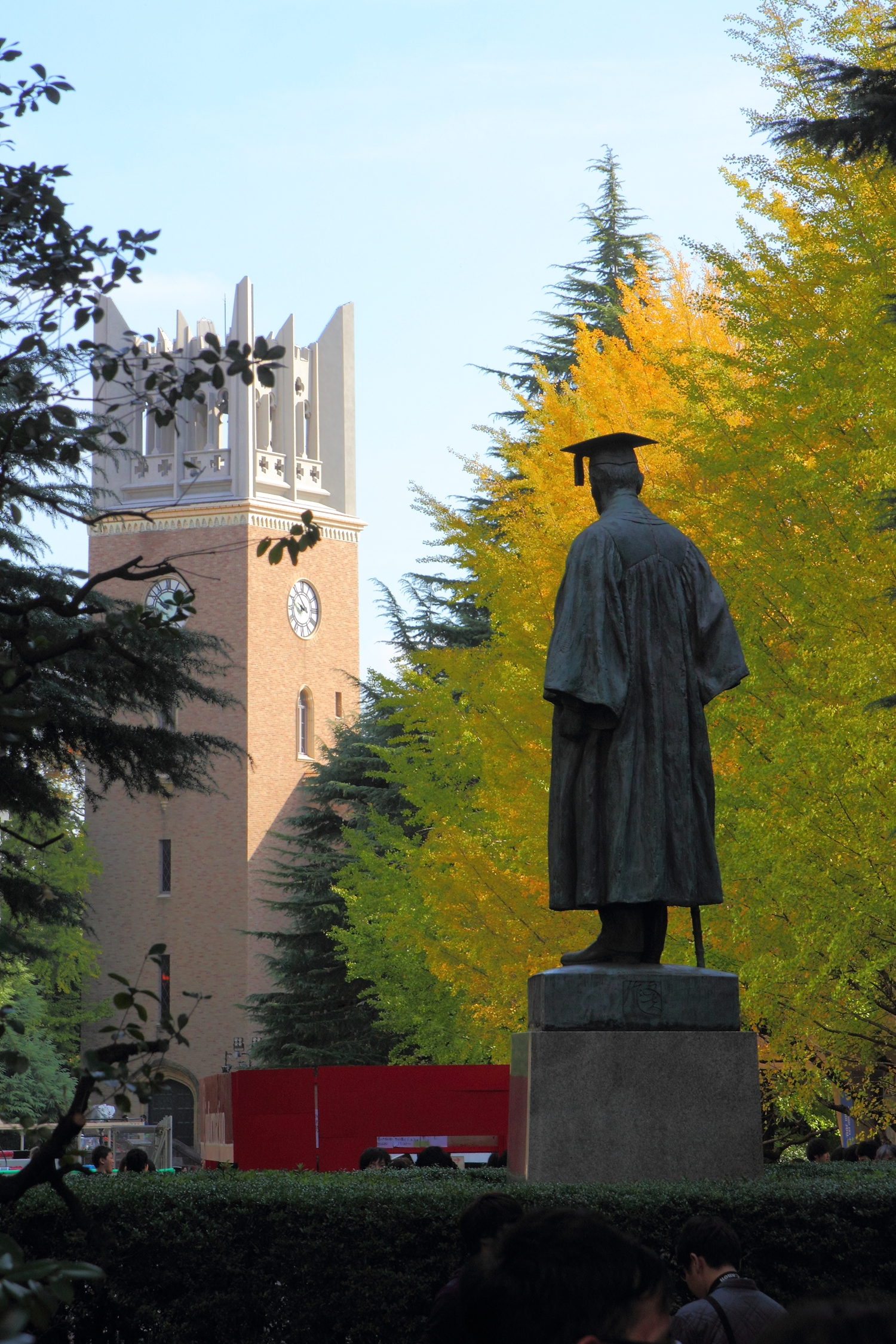 早稲田大学早稲田キャンパス（東京都新宿区）